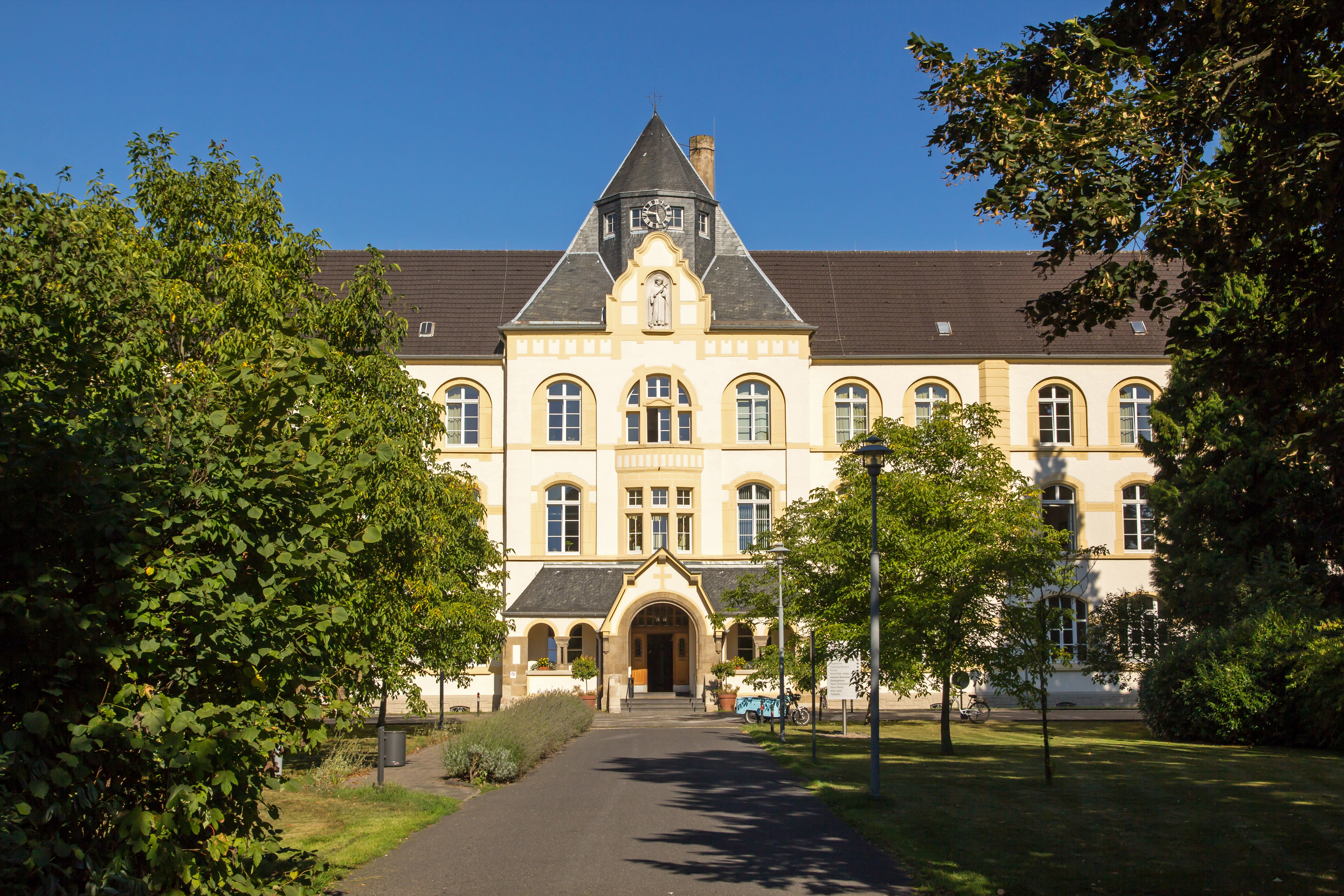 Alexianerkrankenhaus in Köln-Porz-EnsenThis is a photograph of an architectural monument.